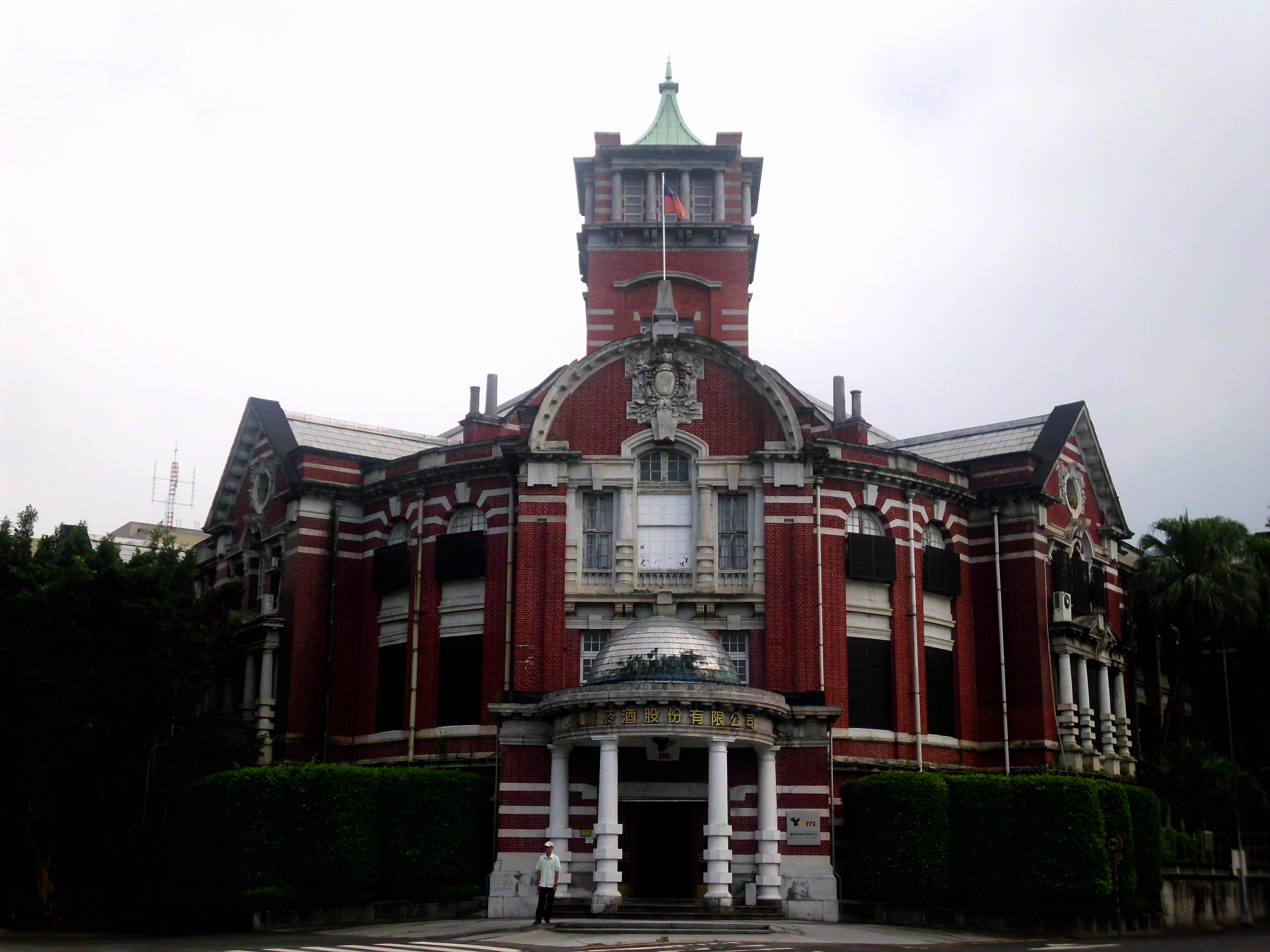 中文（台灣）: 台灣菸酒公司。